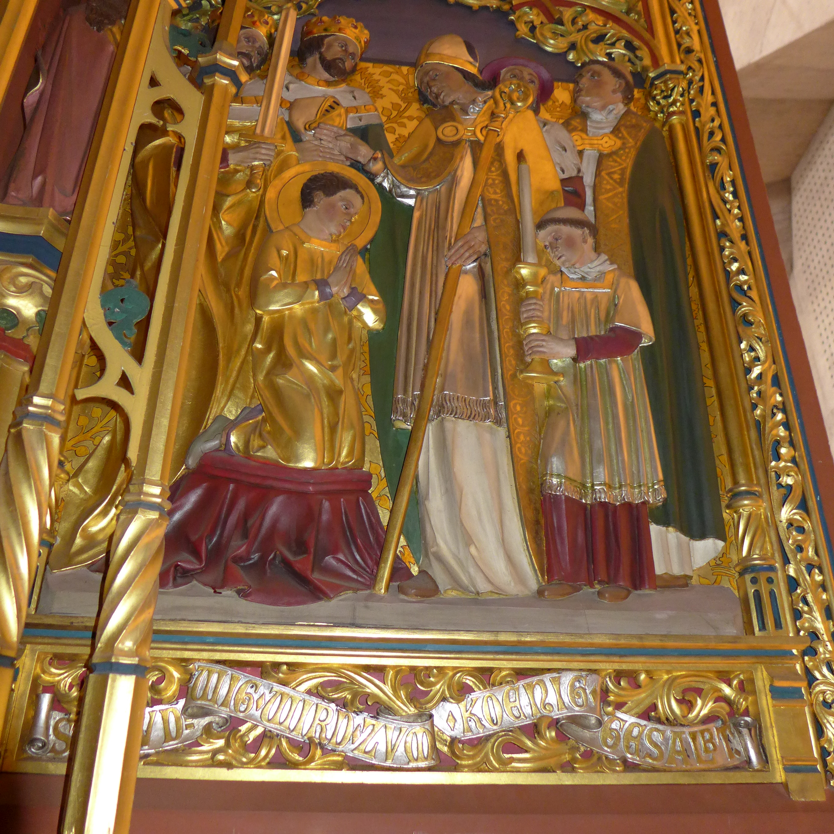 St. Ludwig (Saarlouis), Neogotischer Flügelaltar, Flügelrelief "Die Königssalbung Ludwigs in Reims"